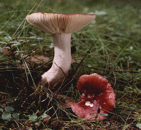 Kirschroter Speitäubling Fotograf: Walter J. Pilsak, Waldsassen Copyright Status: GNU Freie Dokumentationslizenz